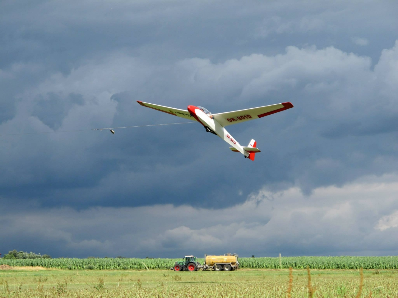 Kluzák K-7, Aeroklubu Chrudim na soustředění v Žamberku. Autor Adam Š.